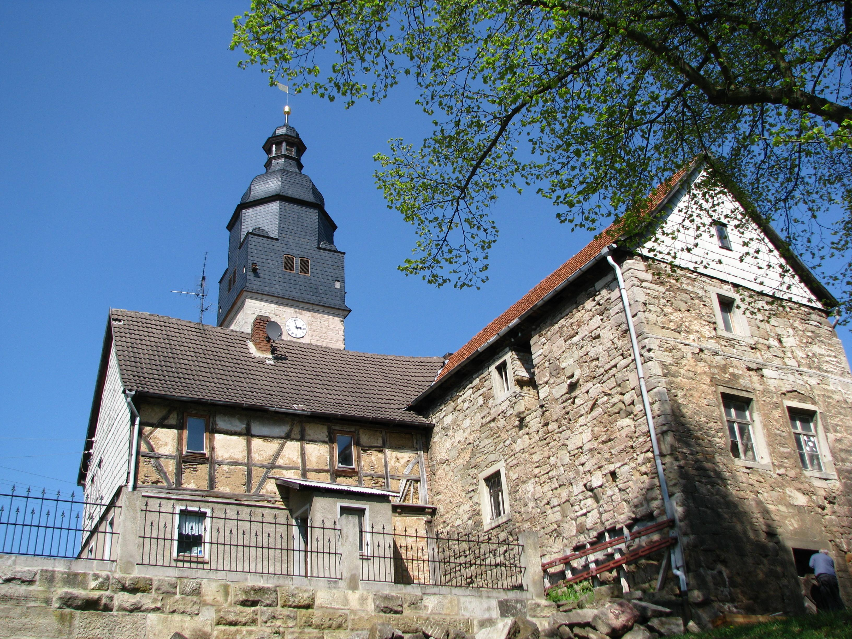 Sankt Peter und Paul in Oberdorla. Davor das ehemalige Stiftsgebäude.